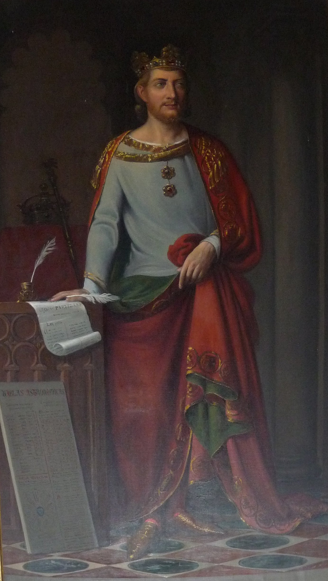 Retrato imaginario de Alfonso X de Castilla (1221-1284), conservado en el Alcázar de Segovia. Alfonso X fue hijo del rey Fernando III de Castilla y de la reina Beatriz de Suabia. Reinó entre los años 1252 y 1284, en que falleció. A la muerte de su padre, Fernando III, reanudó la ofensiva contra los musulmanes, ocupando las ciudades de Jerez de la Frontera (1253) y Cádiz (c. 1262). En 1264 tuvo que hacer frente a una importante revuelta de los mudéjares de Murcia y el valle del Guadalquivir. Como hijo de Beatriz de Suabia, aspiró al trono del Sacro Imperio Romano Germánico, proyecto al que dedicó más de la mitad de su reinado sin obtener éxito alguno. Los últimos años de su reinado fueron especialmente sombríos, debido al conflicto sucesorio provocado por la muerte prematura de su hijo primogénito, el infante Fernando de la Cerda, y la minoridad de sus hijos, lo que desembocó en la rebelión abierta del infante Sancho, segundo hijo de Alfonso X, y de gran parte de la nobleza y las ciudades del reino. Alfonso X murió en Sevilla en 1284, durante el transcurso de esta revuelta, no sin antes haber desheredado a su hijo Sancho, que le sucedió en el trono. Alfonso X también es reconocido por la obra literaria, científica, histórica y jurídica realizada por su escritorio real. Alfonso X patrocinó, supervisó y a menudo participó con su propia escritura y en colaboración con un conjunto de intelectuales latinos, hebreos e islámicos, conocido como Escuela de Traductores de Toledo, en la composición de una ingente obra literaria que inició en buena medida la prosa en castellano.